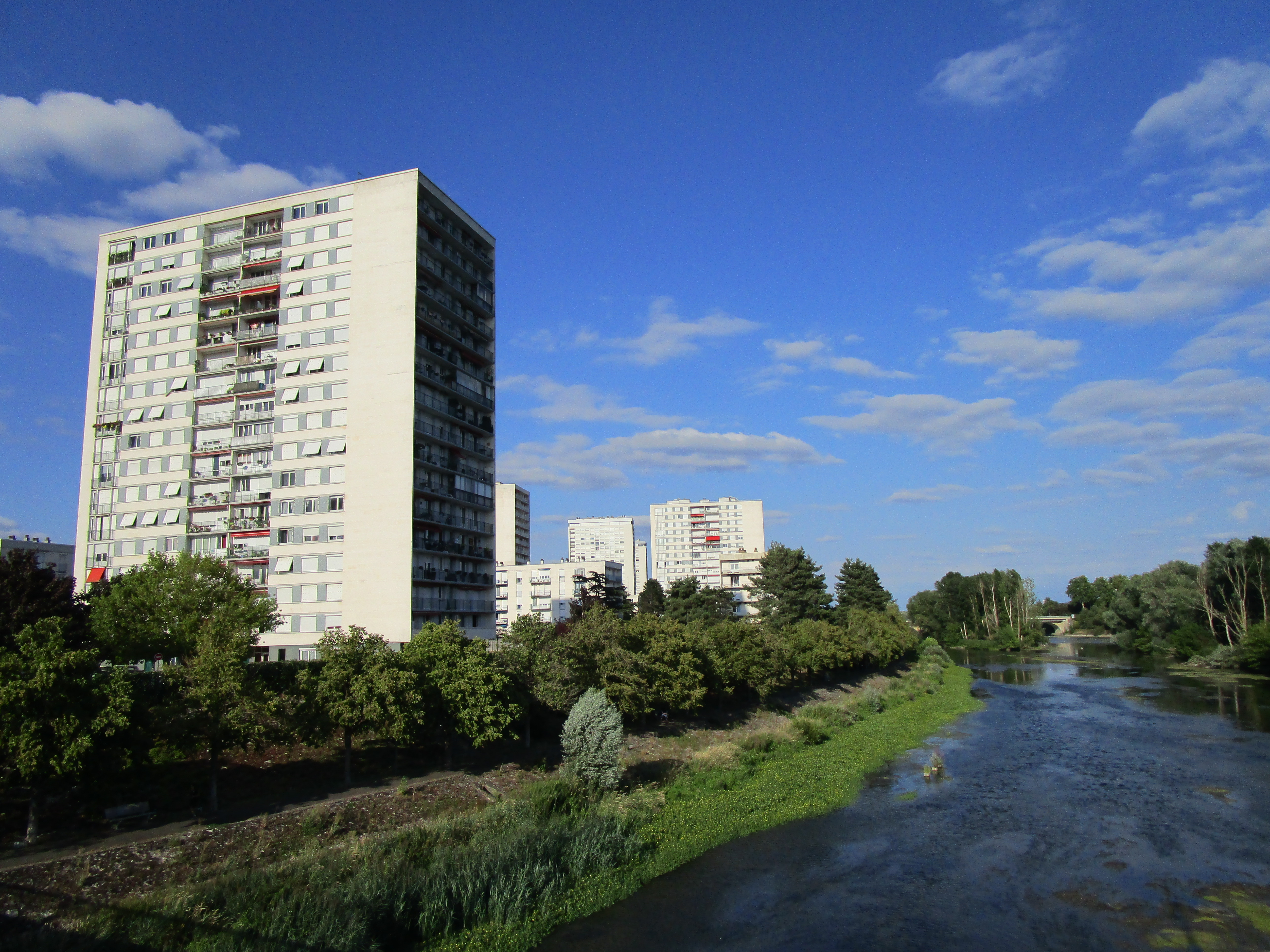 Le quartier des Rives du Cher de Tours, vu depuis le pont de Vendée, coté est.